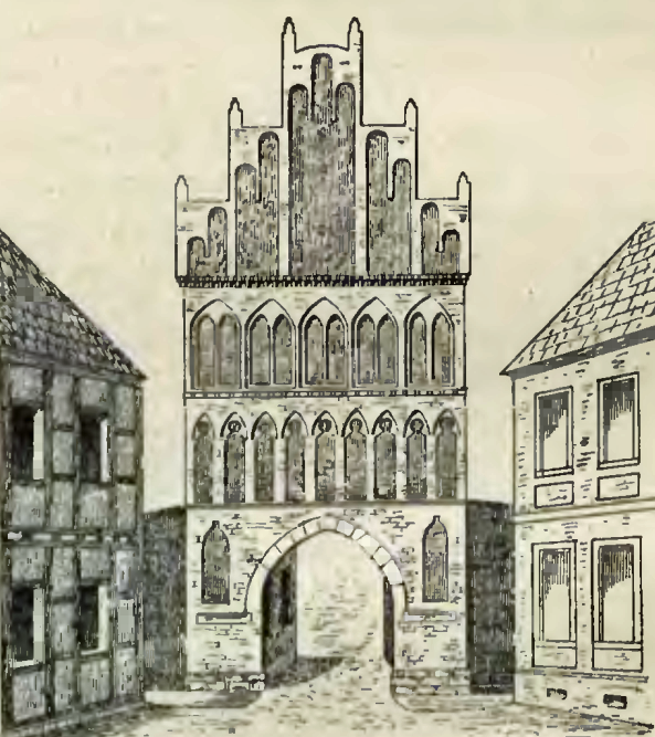 Abbildung des 1824 abgerissenen Kahldentores in Demmin.